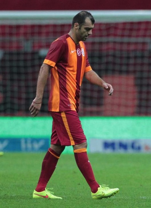 Pandev, Eskişehirspor maçının son anlarında Galatasaray formasını giydi.